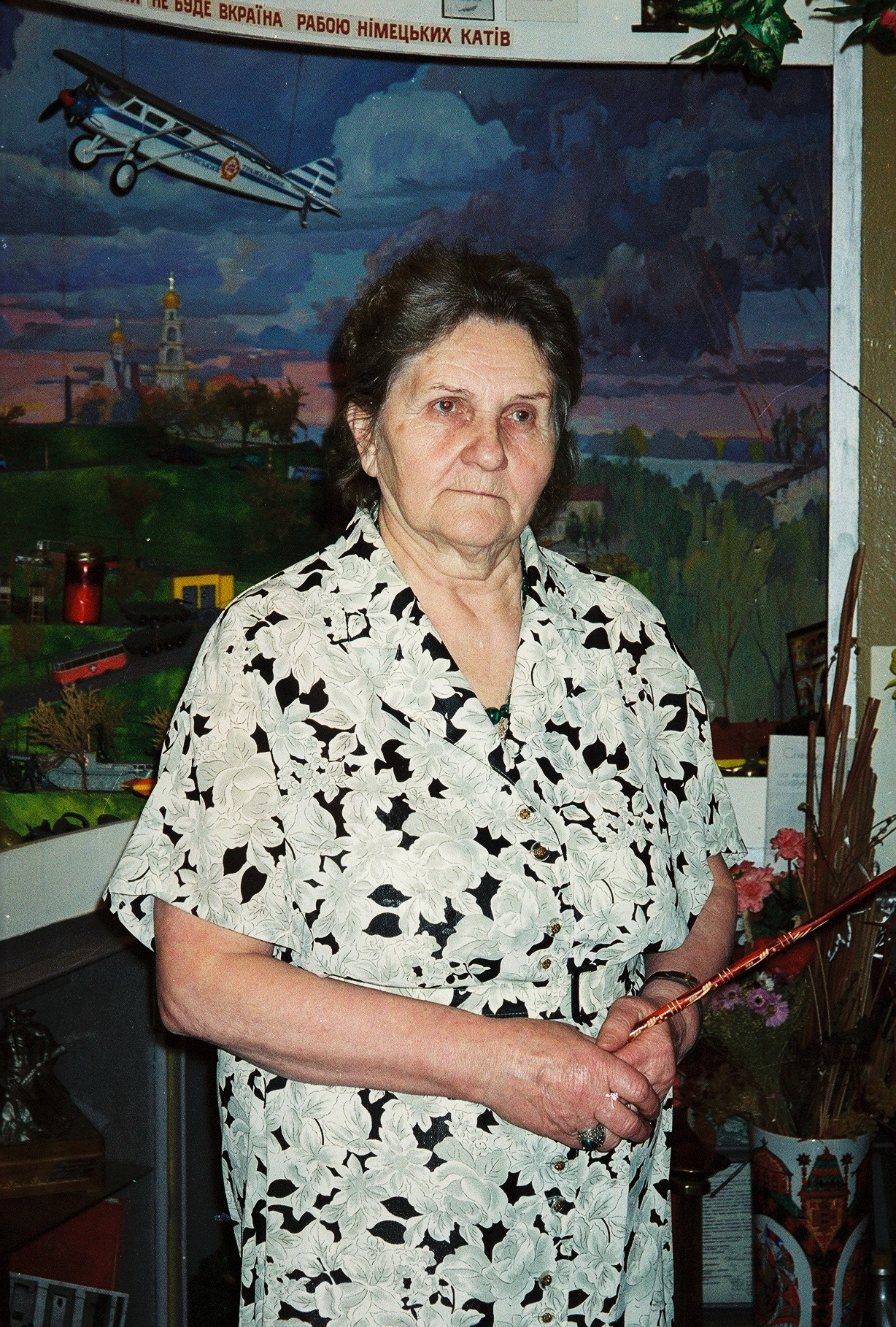 Ливинская Лидия Архиповна (конец 2000-х)